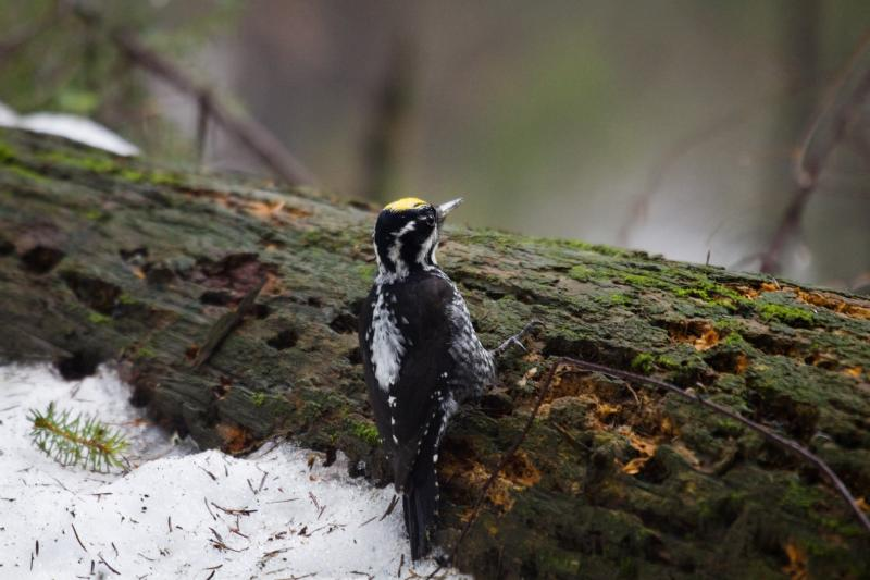 Picchio tridattilo fotografato al Bayerischer Wald (Germania) - bosco.